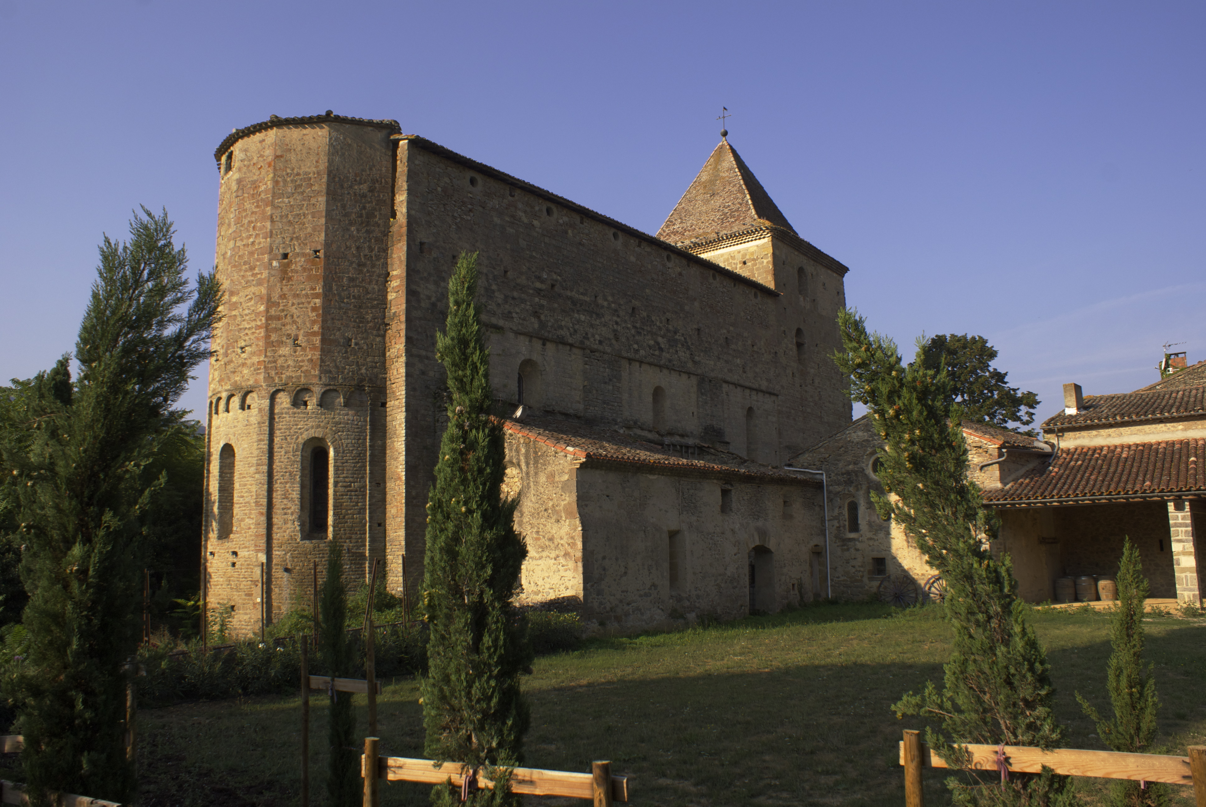 Abbatiale Saint-Polycarpe de Saint-Polycarpe (Aude, France) .